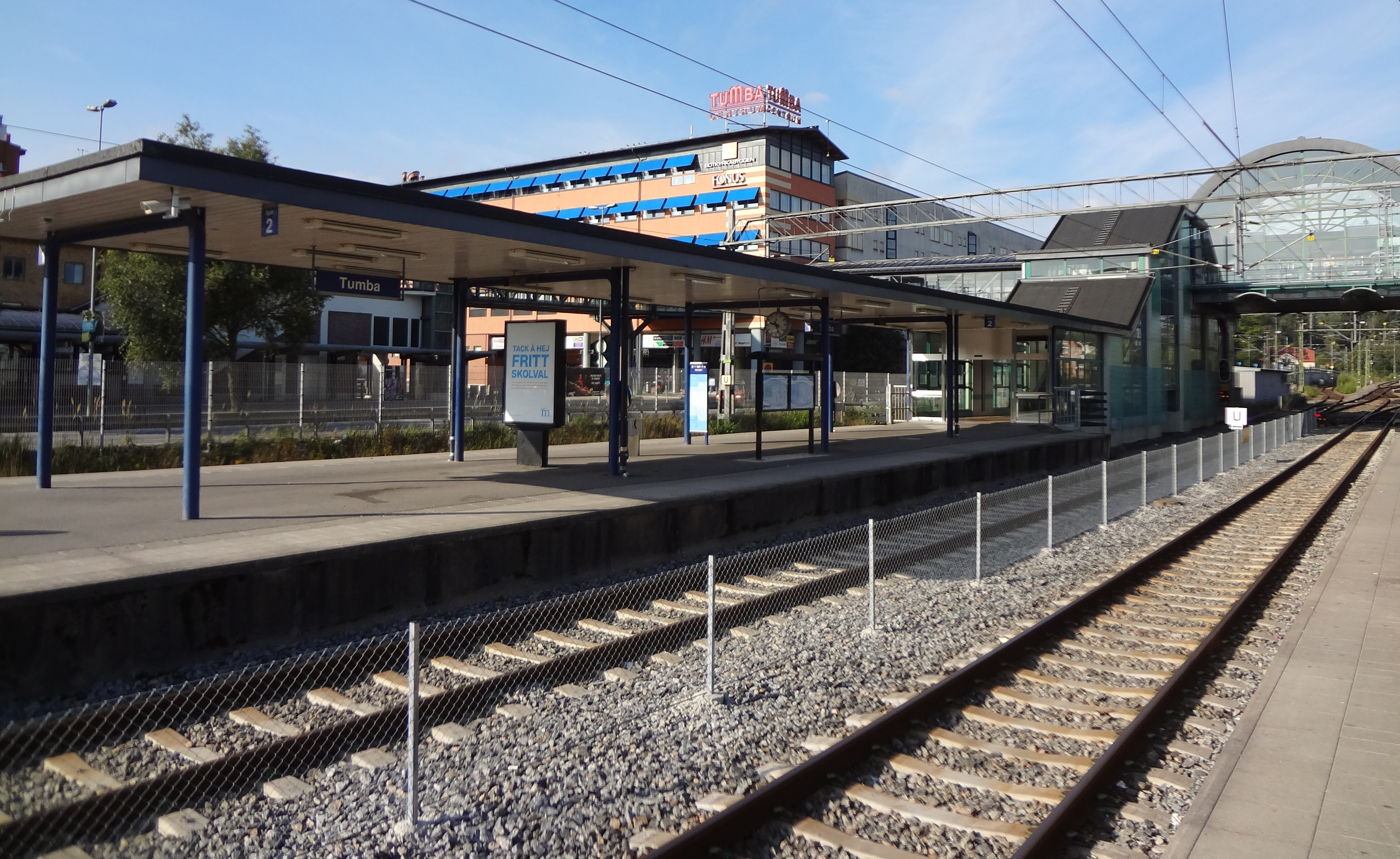 Tumba station 2014.